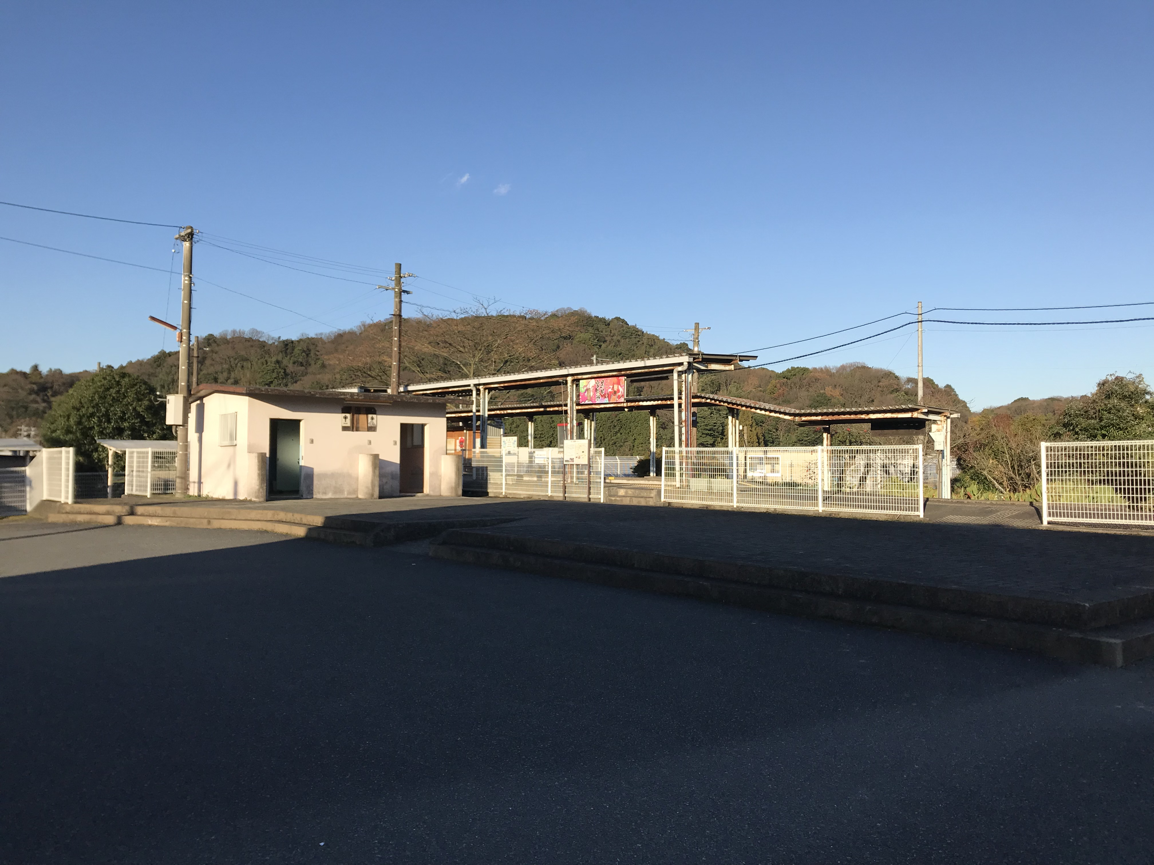 豊津駅の遠景